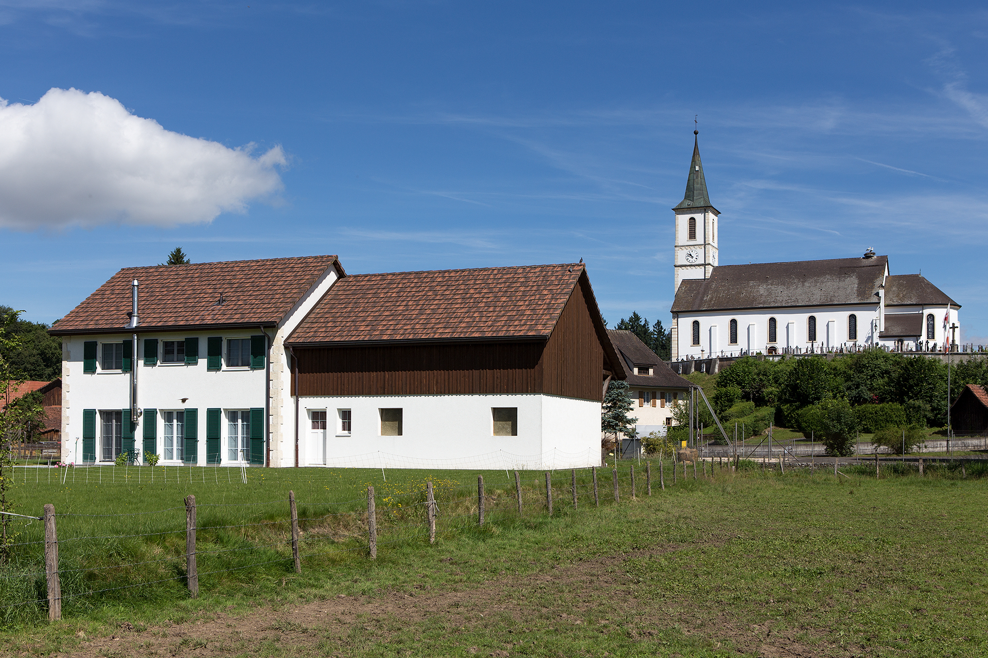 Kirche Saint Ferréol-et-Ferjeux in Dampfhreux (JU) Es sind zwei Störche auf dem Dachhorst zu sehen.